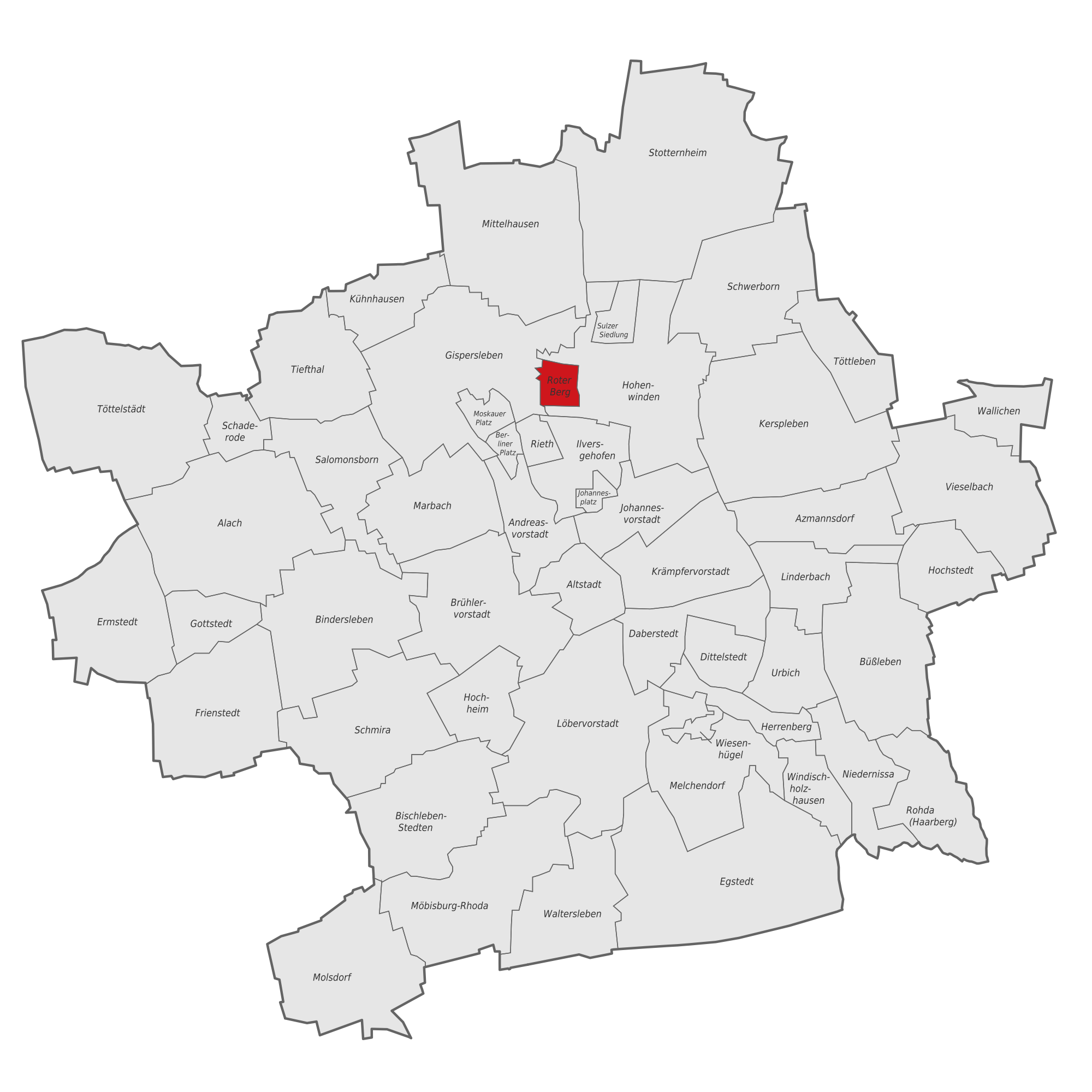 Karte des Stadtgebietes von Erfurt mit Hervorhebung des Ortsteiles Roter Berg